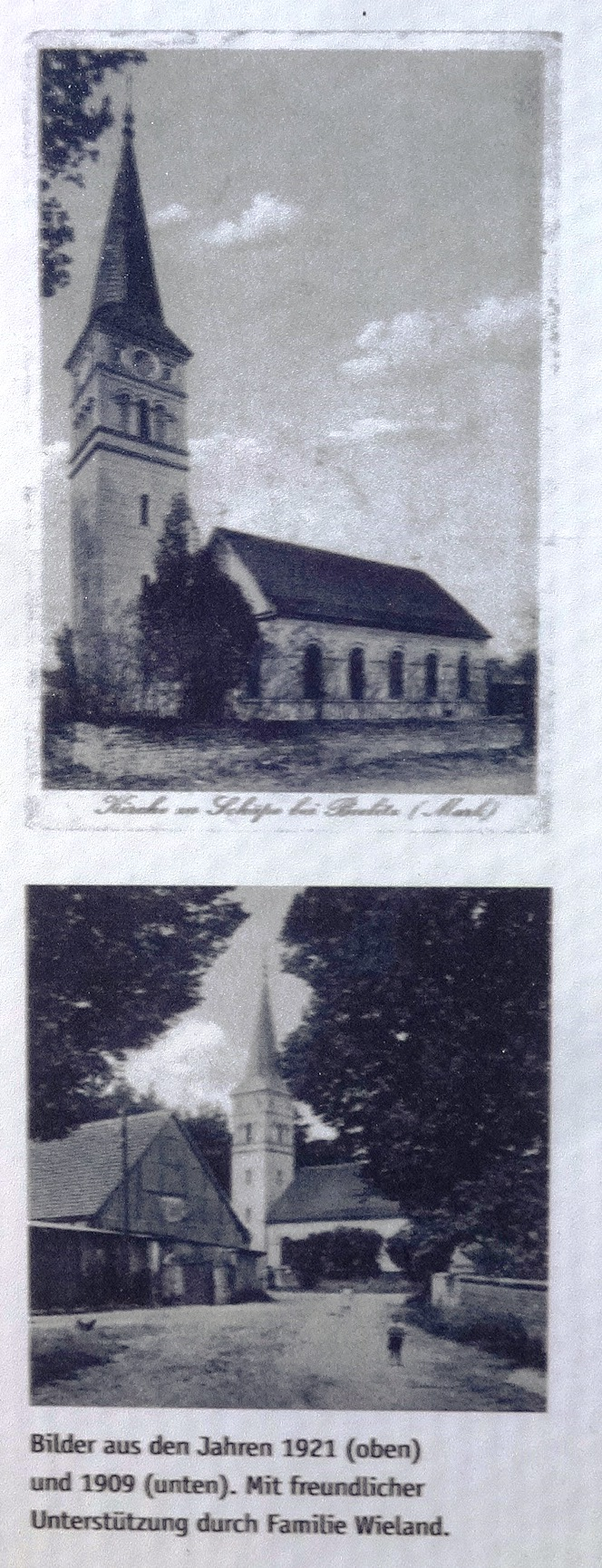 Die Dorfkirche Schäpe ist eine Saalkirche mit Apsis, die im Jahr 1755 errichtet wurde. Im Innern befinden sich eine polygonale Kanzel sowie eine Hufeisenempore aus der Bauzeit der Kirche. Die Orgel stammt aus der Mitte des 19. Jahrhunderts. Die Aufnahme befindet sich auf einer öffentlich zugänglichen Tafel an der östlichen Einfriedung der Kirche.